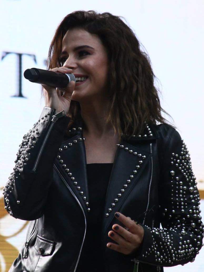 Türk şarkıcı Simge, 15. Radyo Boğaziçi Müzik Ödülleri'nde.